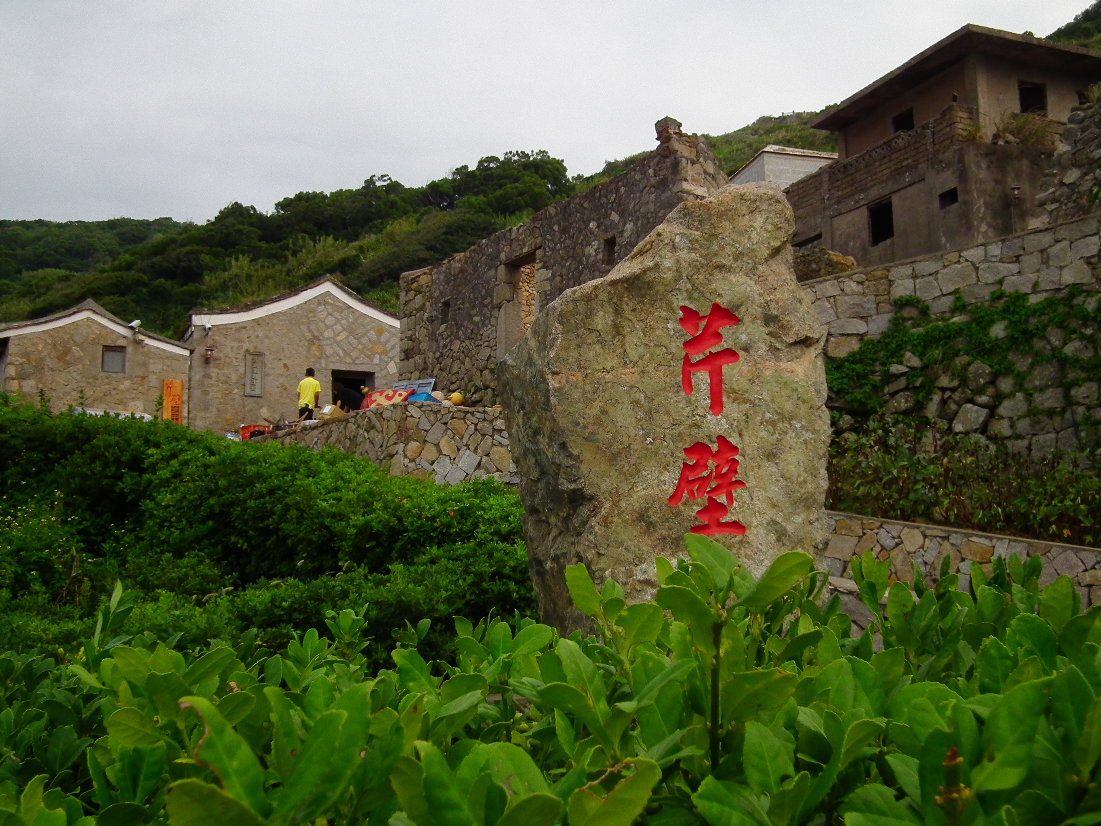 Qinbi Village 芹壁村